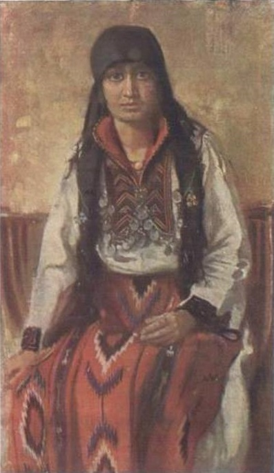 Мома од Радибуш, Кривопаланечко